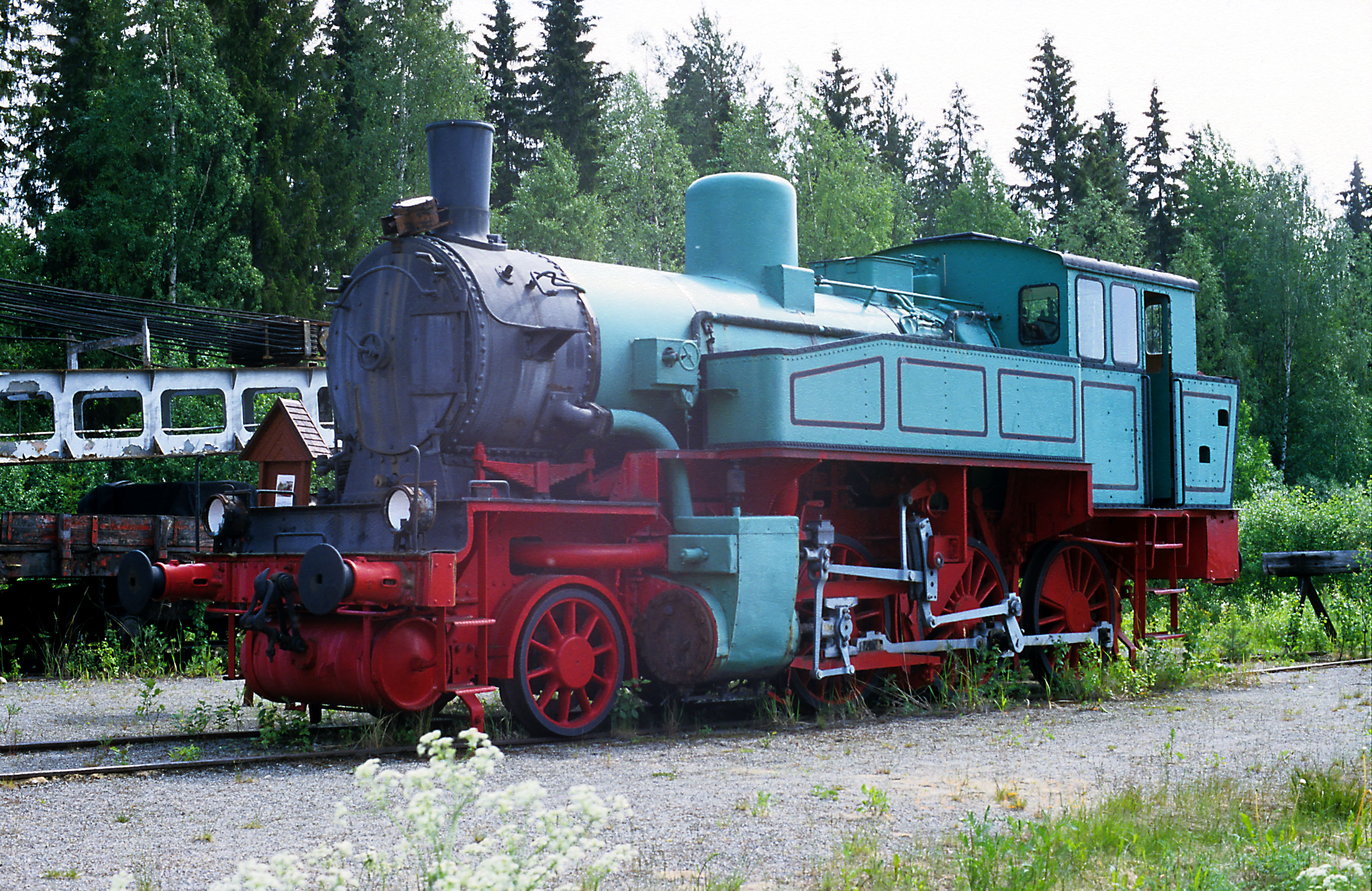 eindeutig eine preußische T9³, allerdings muss diese Maschine breitspurig geliefert worden sein. Umbauspuren sind zumindest nicht zu erkennen. Dampflokpark Hapamäki